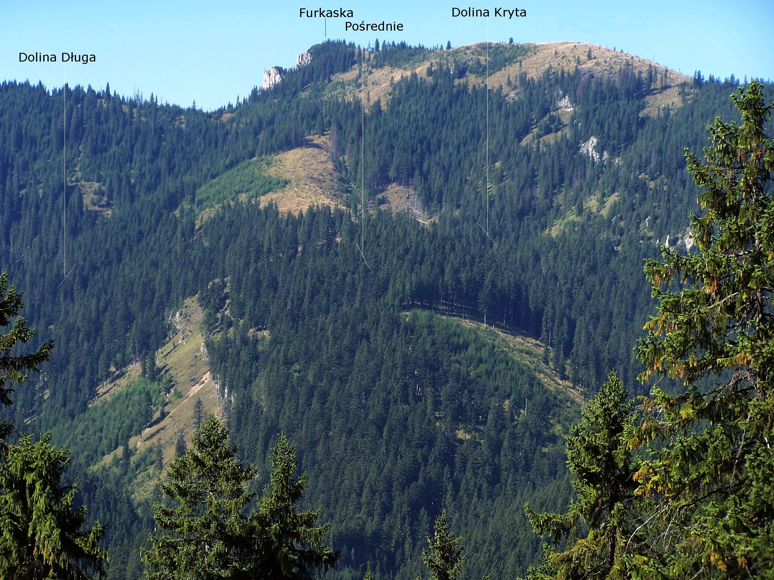 Widok z Polany Jamy.